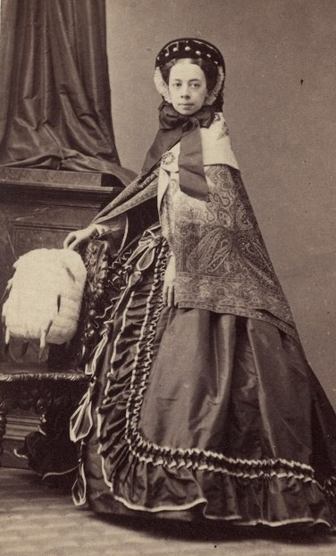 Княгиня Паулина Клементина фон Меттерних (1836 - 1921)